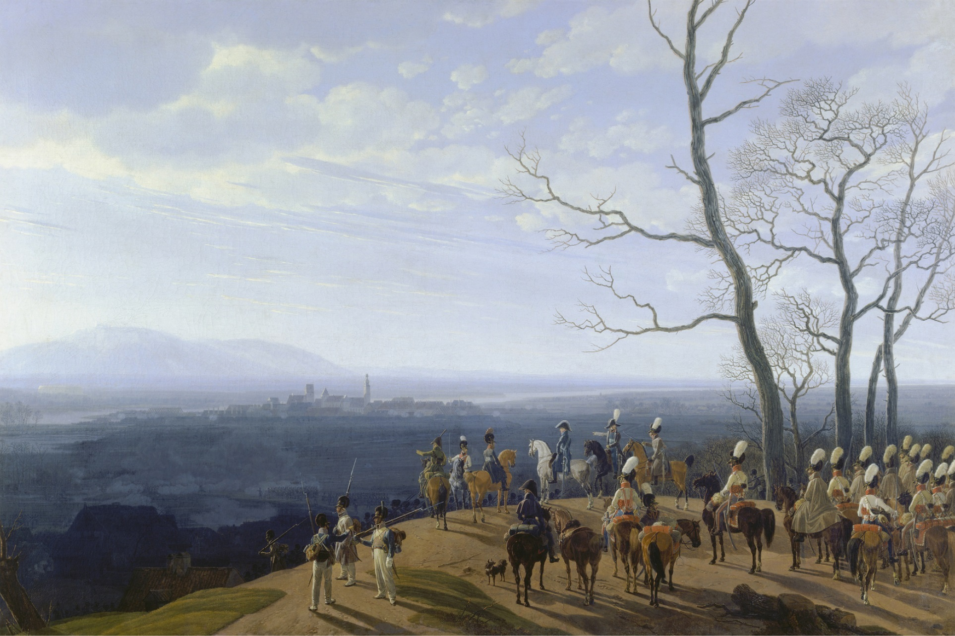 Die Belagerung von Koźle/Cosel in Schlesien (Abwehr eines Ausfalls der preußischen Besatzung durch die Bayern im Dritten Koalitionskrieg am 15. März 1807)